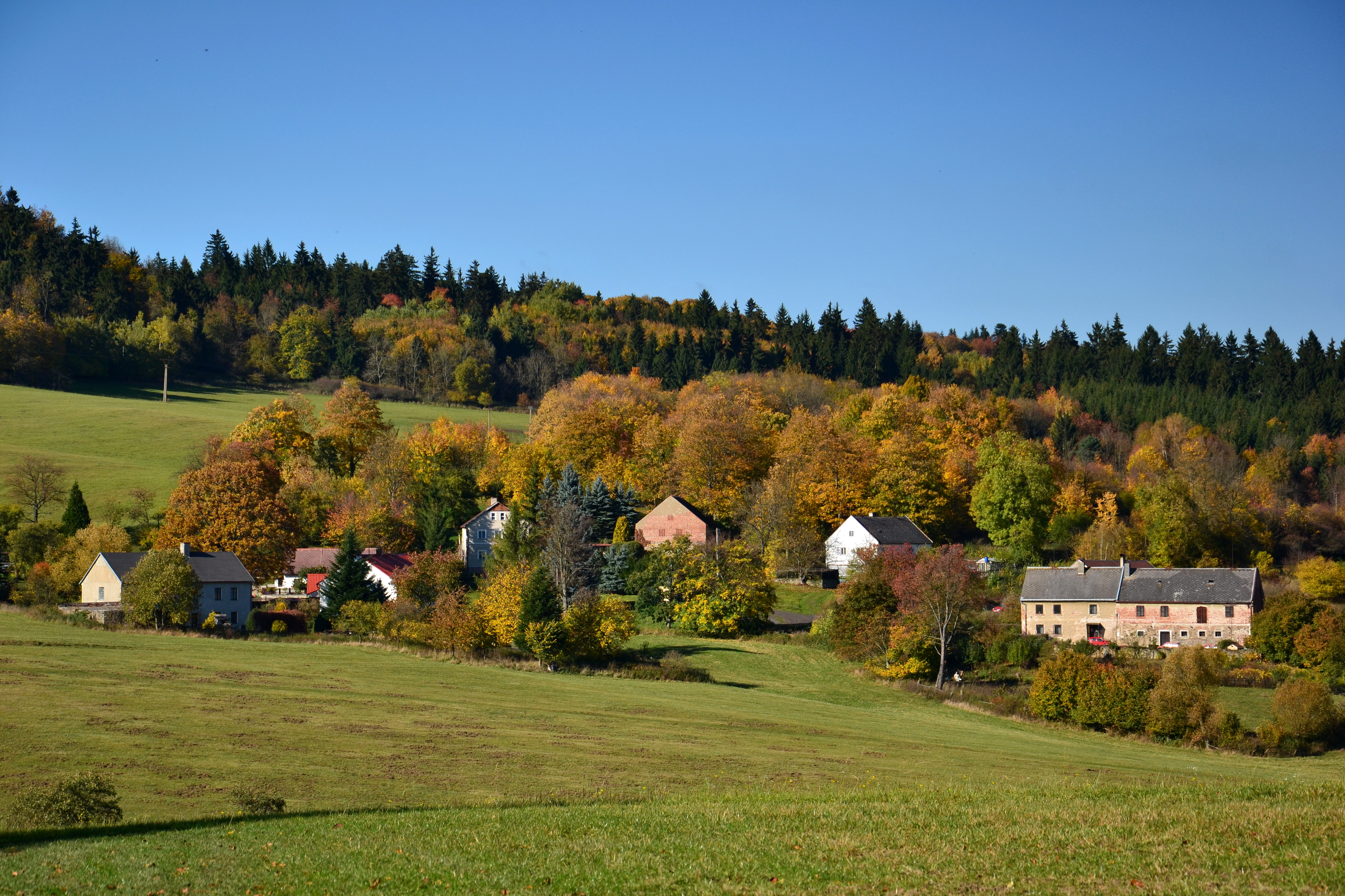 Hlineč – celkový pohled z jihovýchodu